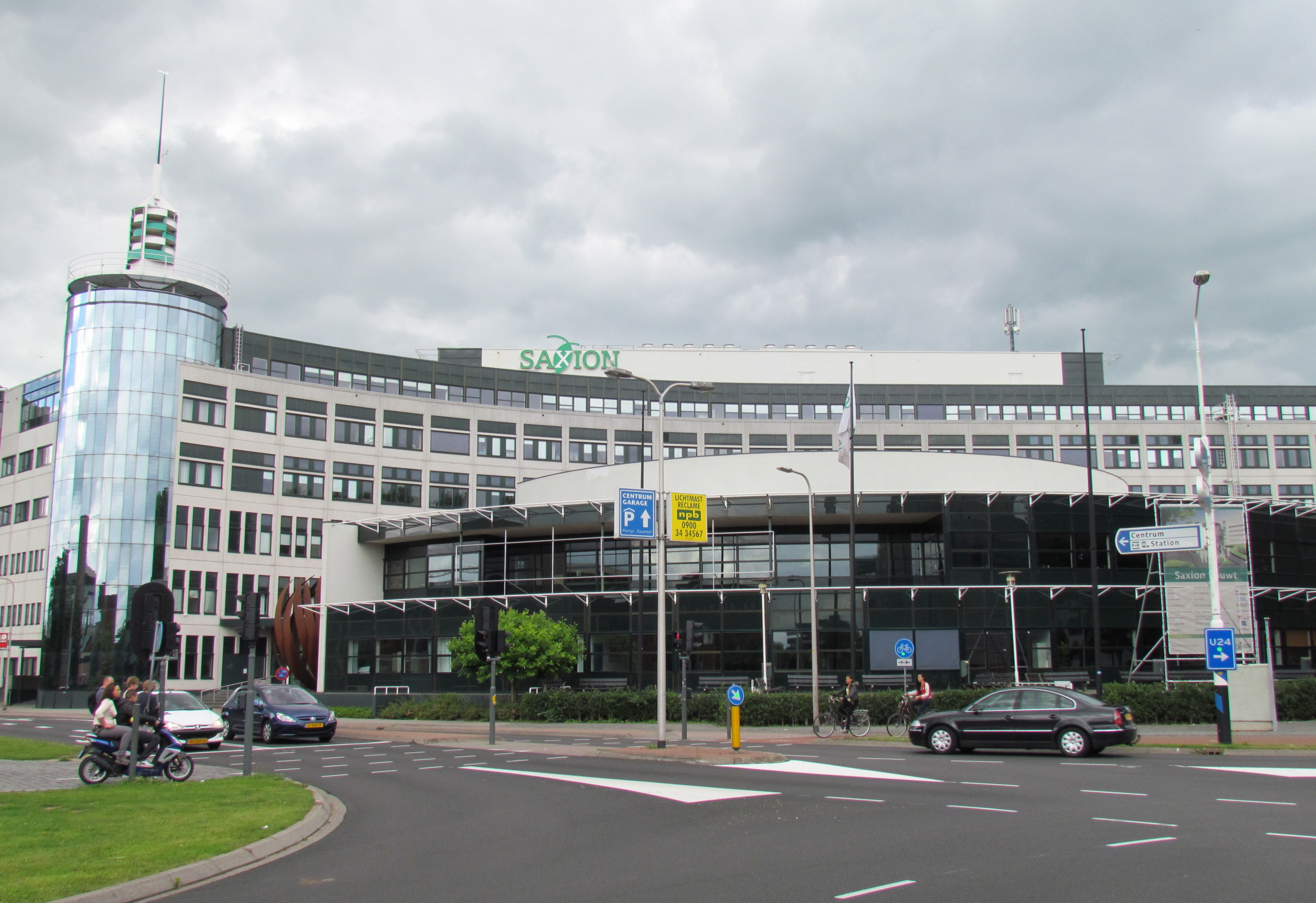 Deventer vestiging van Saxion Hogescholen, zomer 2012